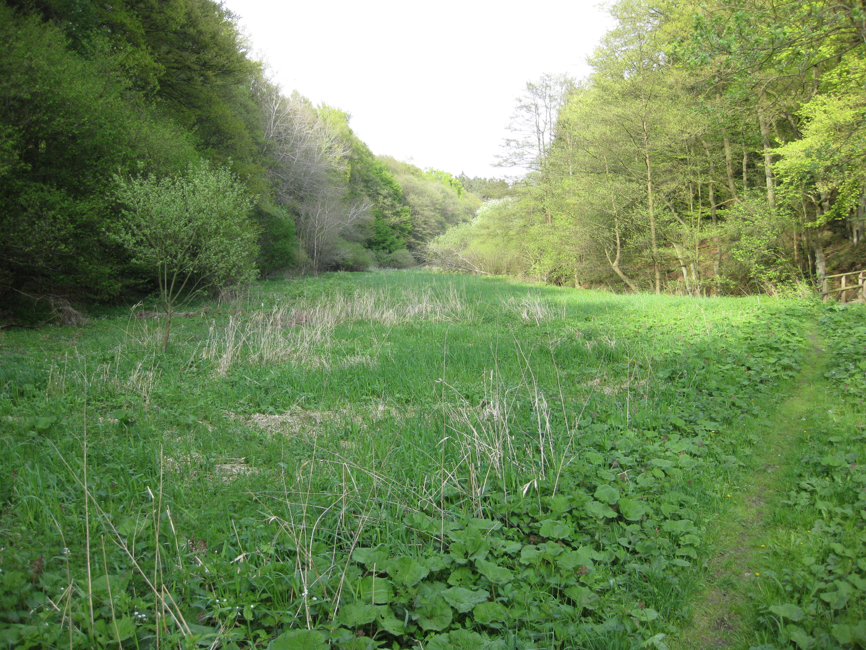 Landschaftsschutzgebiet Kloßsiepen, Brilon-Scharfenberg, Nordrhein-Westfalen, Deutschland.